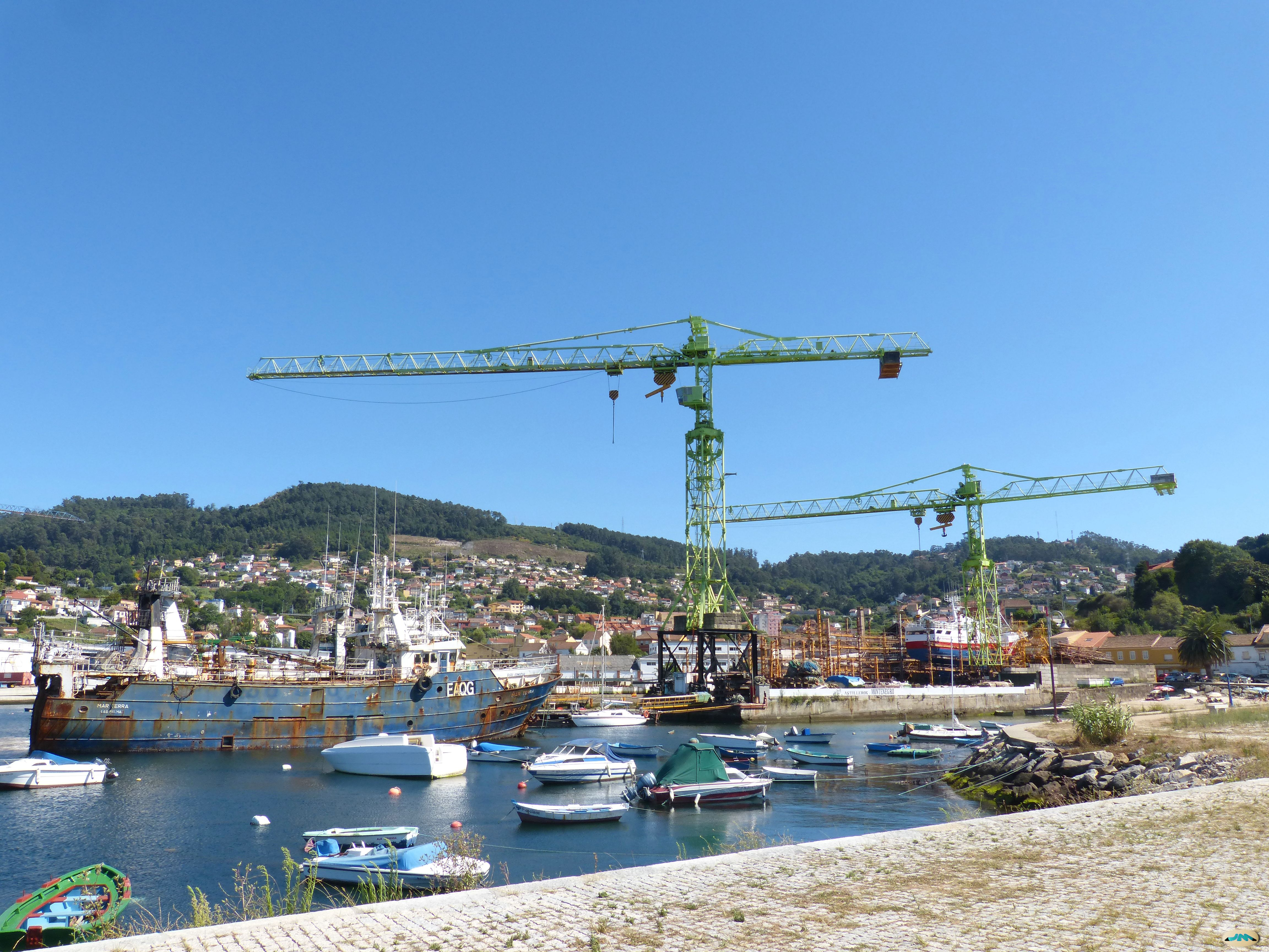 Vigo-Para chapa y pintura en Ríos